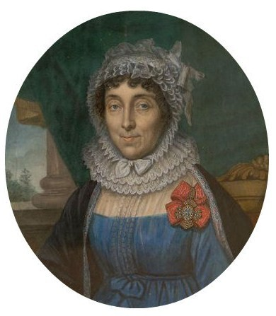 Портрет неизвестной кавалерственной дамы. Анна Логгиновна Ламздорф, урожденная фон Бётлинг (1762—1835).